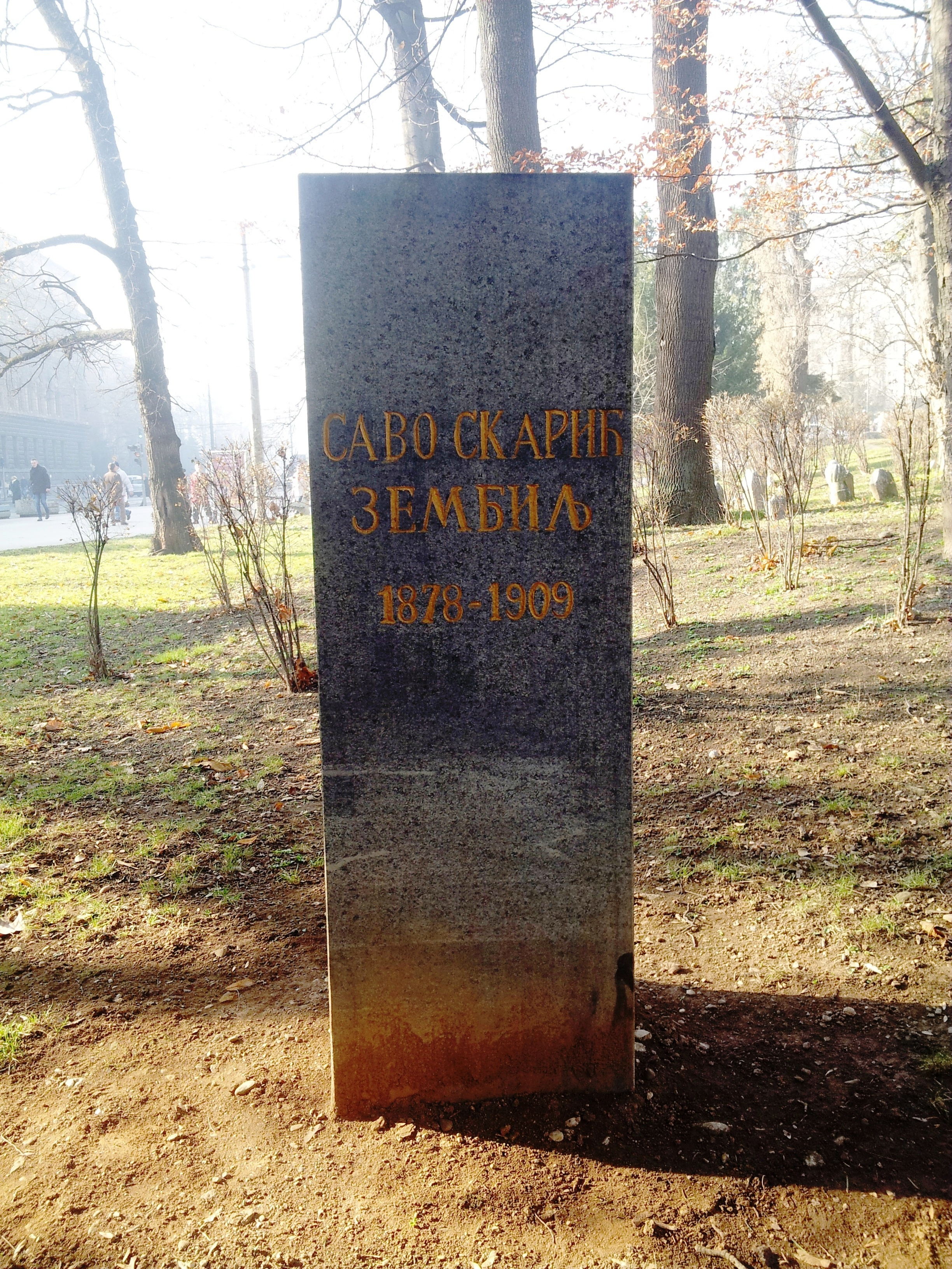 Spomenik Savi Skariću nalazi se u Velikom parku u Sarajevu.